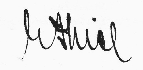 Ernest Thiels namnteckning